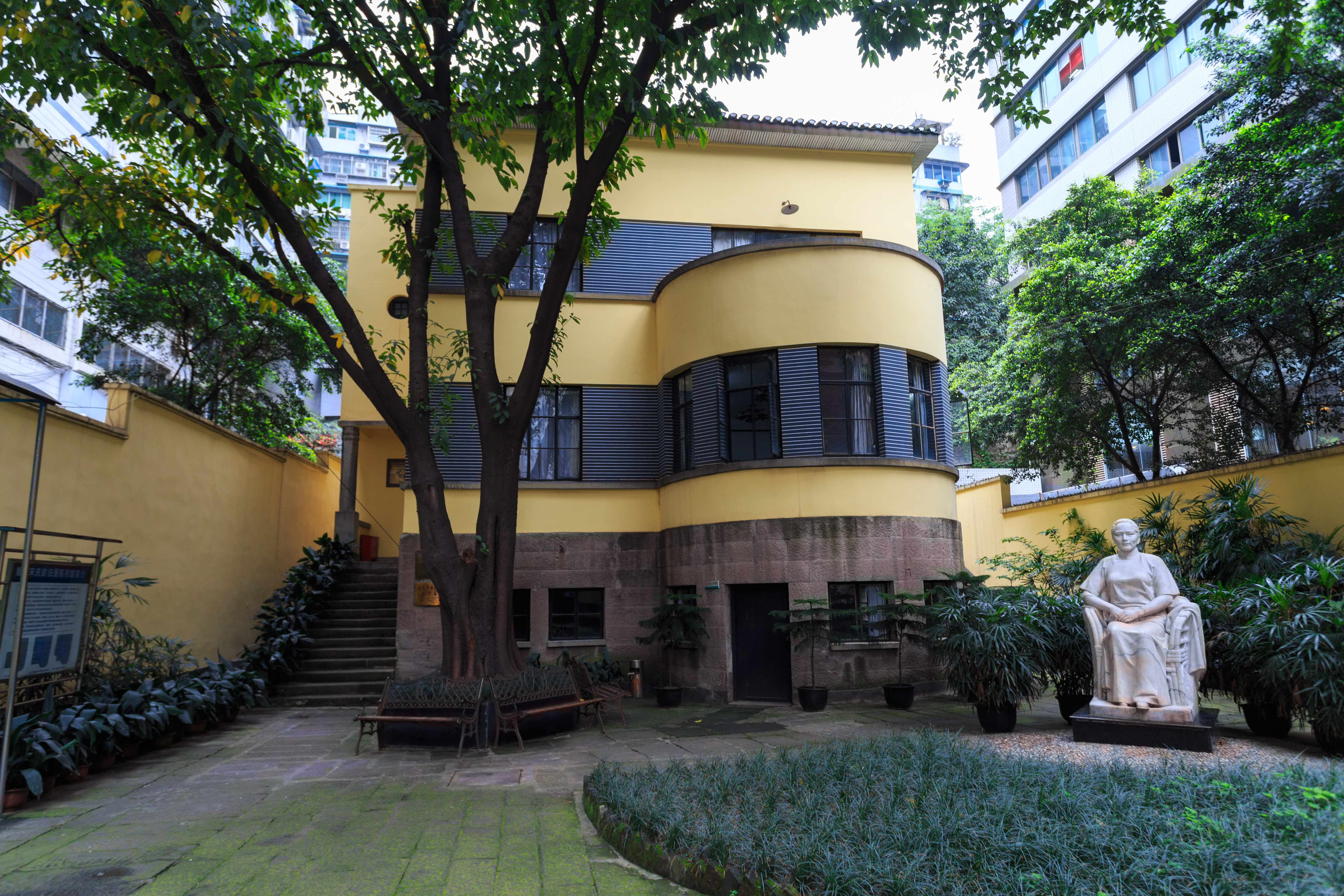 重庆保卫中国同盟总部旧址（宋庆龄旧居）—— 全景